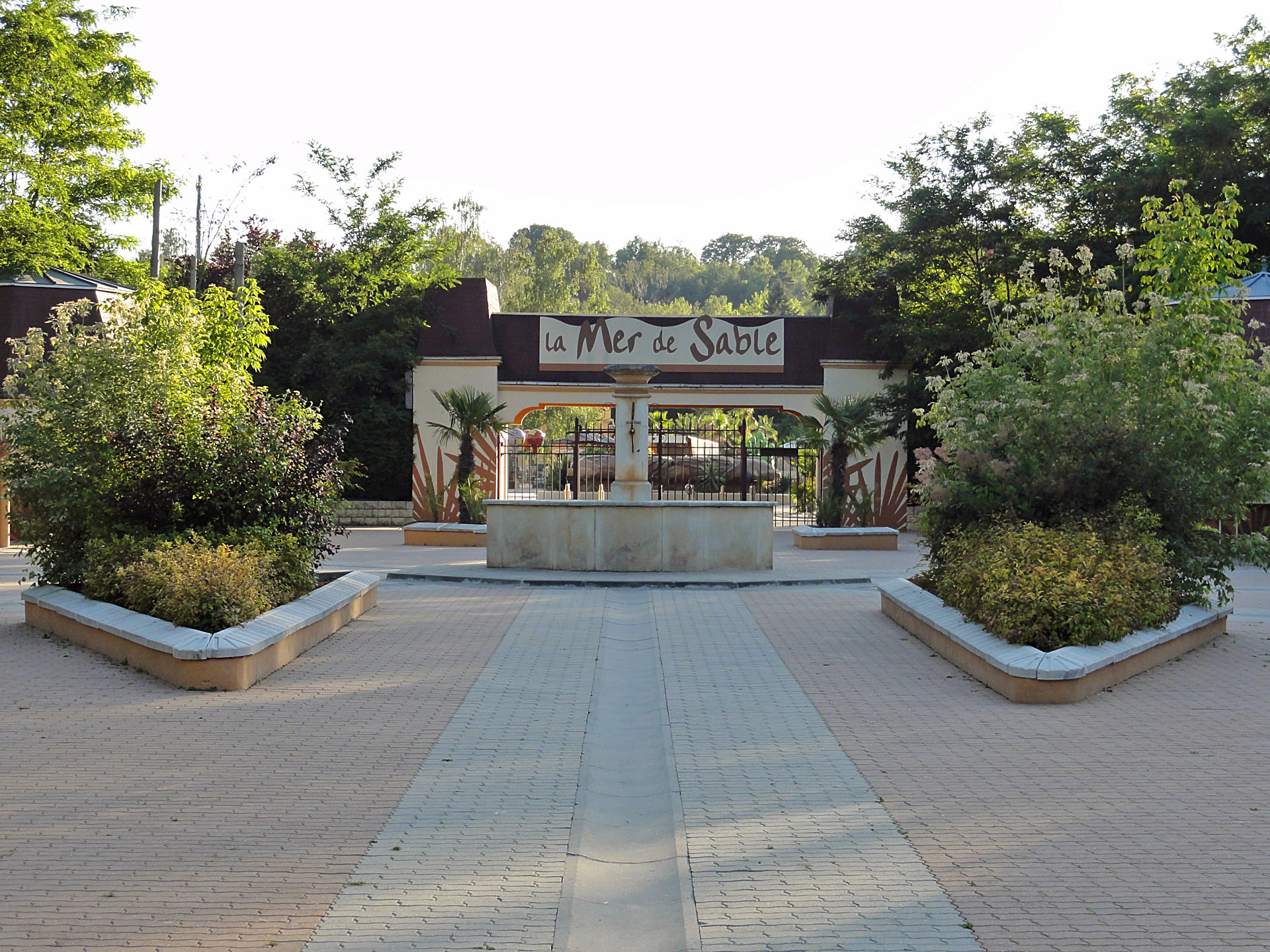 La Mer de sable à Ermenonville, Oise, France.